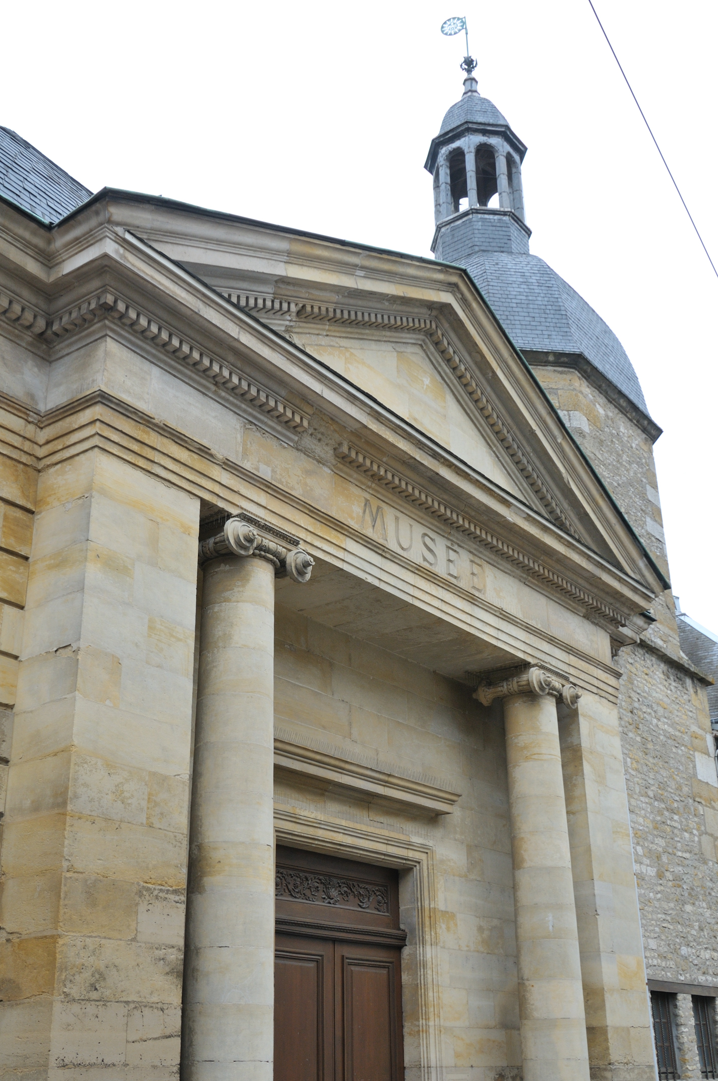 Musée municipal, Pithiviers, Loiret, France